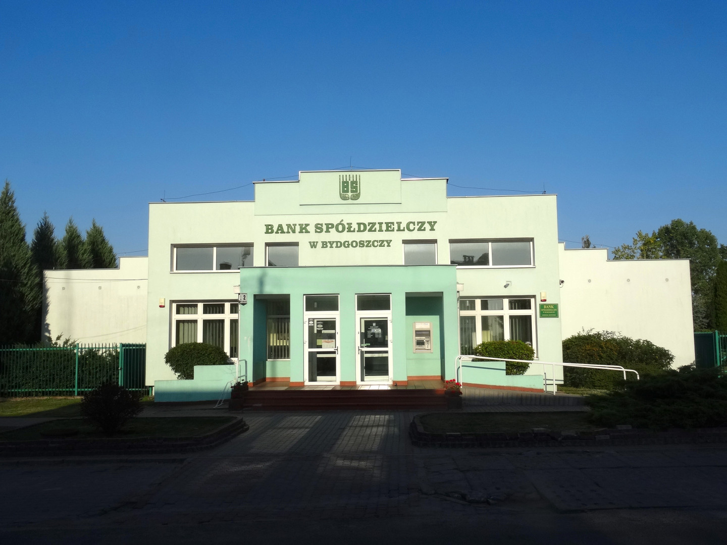 Sicienko - wieś gminna w powiecie bydgoskim, woj. kujawsko-pomorskie